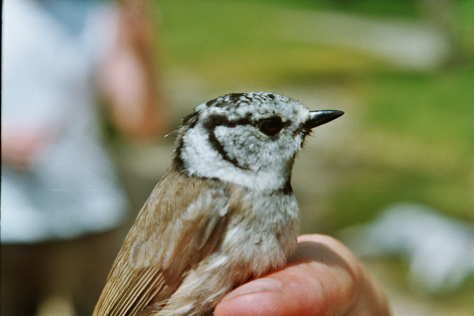 Sýkora parukářka, Parus cristatus